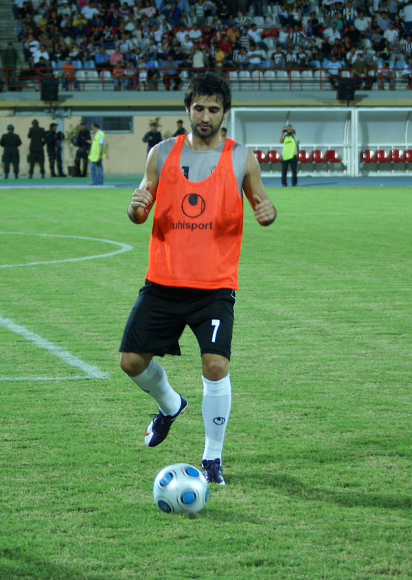 Calentando